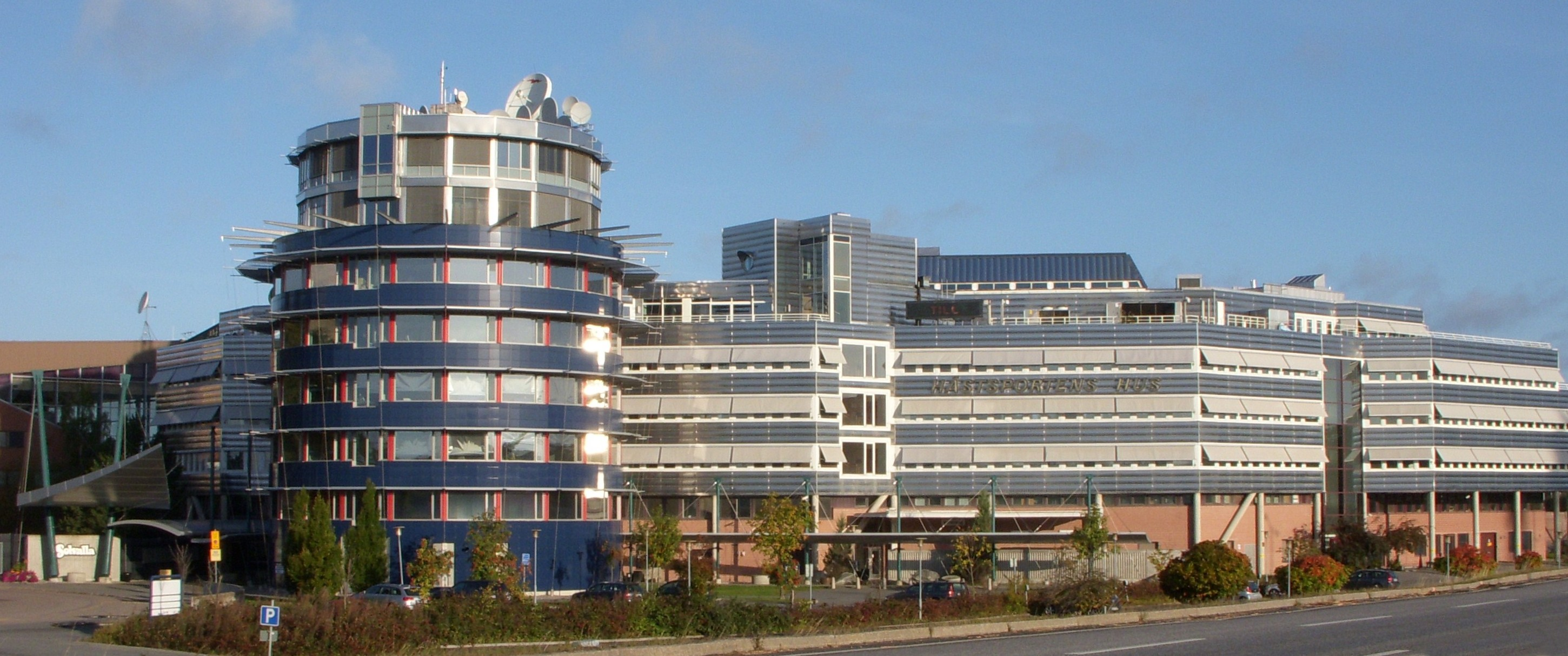 Solvalla travbana med "Hästsportens Hus" i Stockholm, byggnaderna, entrén